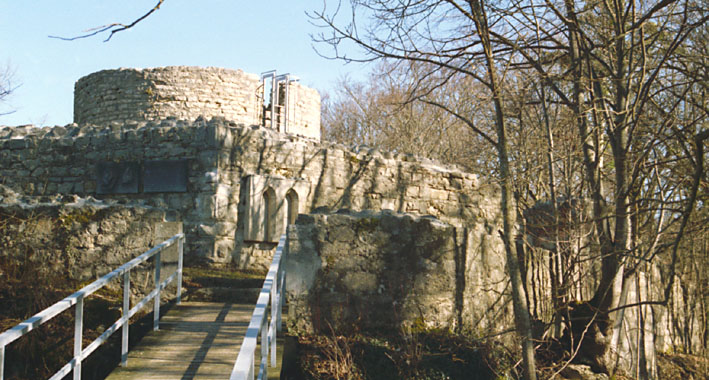 Übersicht Ruine Bischofstein, Sissach